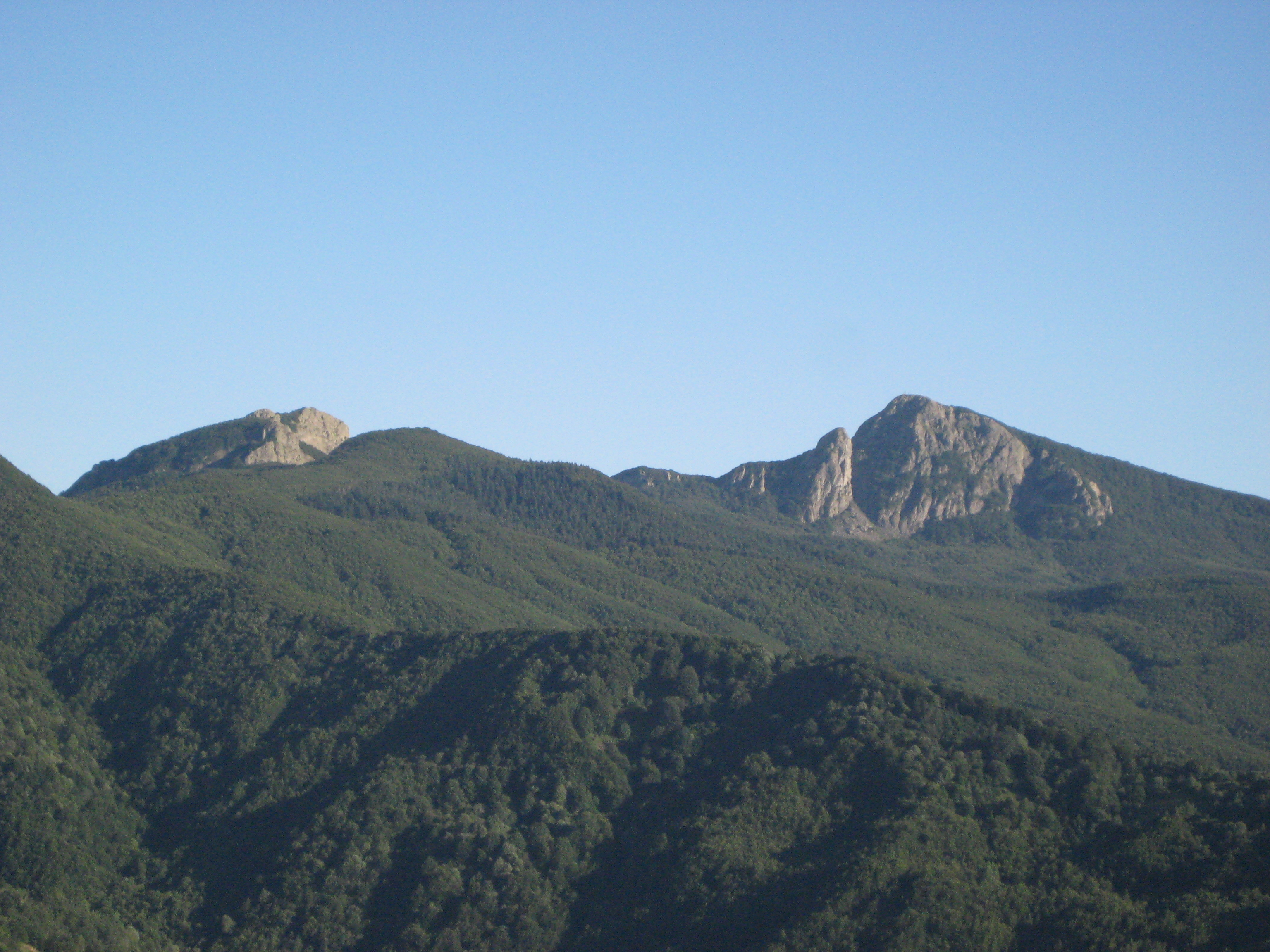 Foto: Monte Penna in estate Autore: Franco Luigi Mazza Proprietà: Franco Luigi Mazza